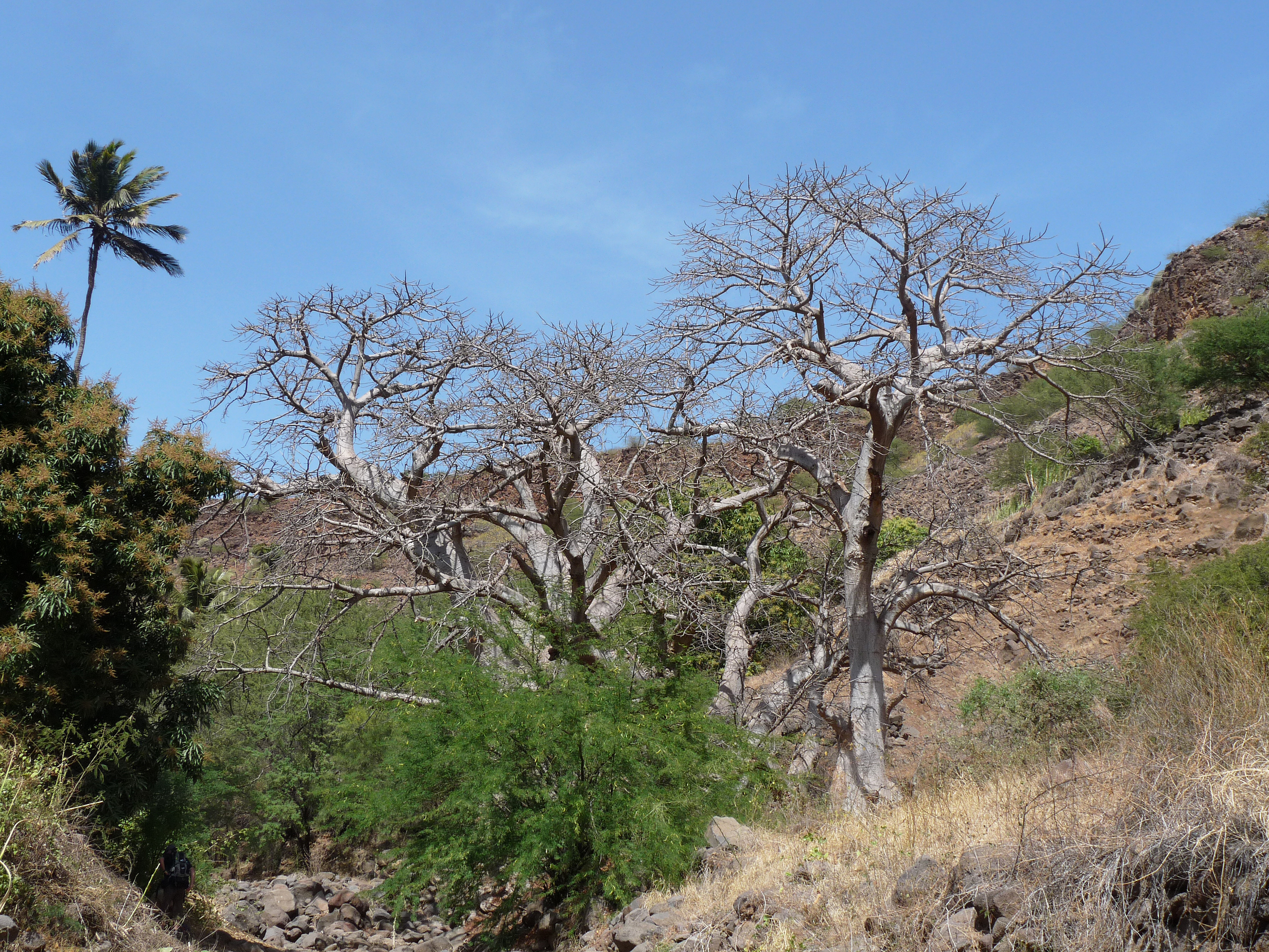 Baobabs dans la vallée de Ribeira Grande de Santiago (Cap-Vert)